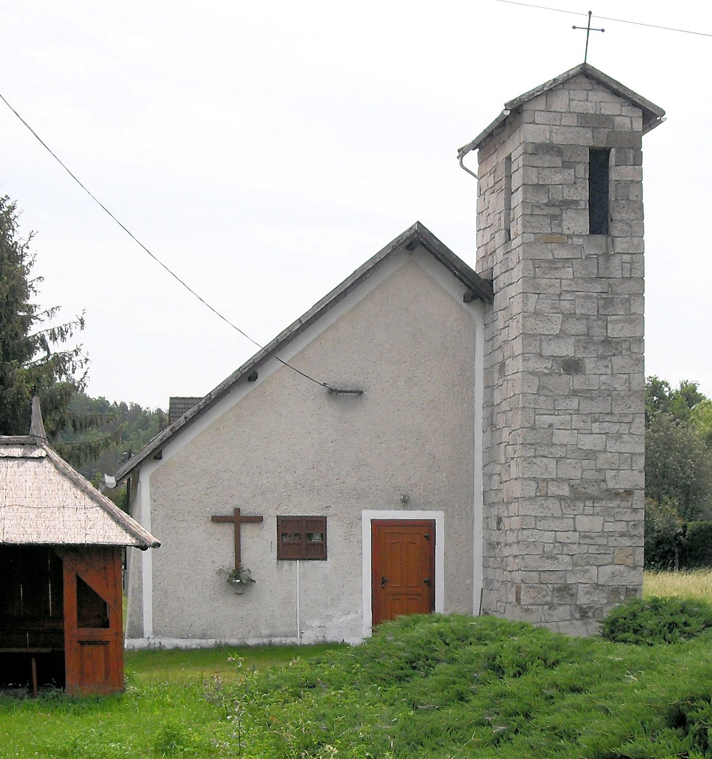 Szent Kereszt Római katolikus templom Füzérkomlós